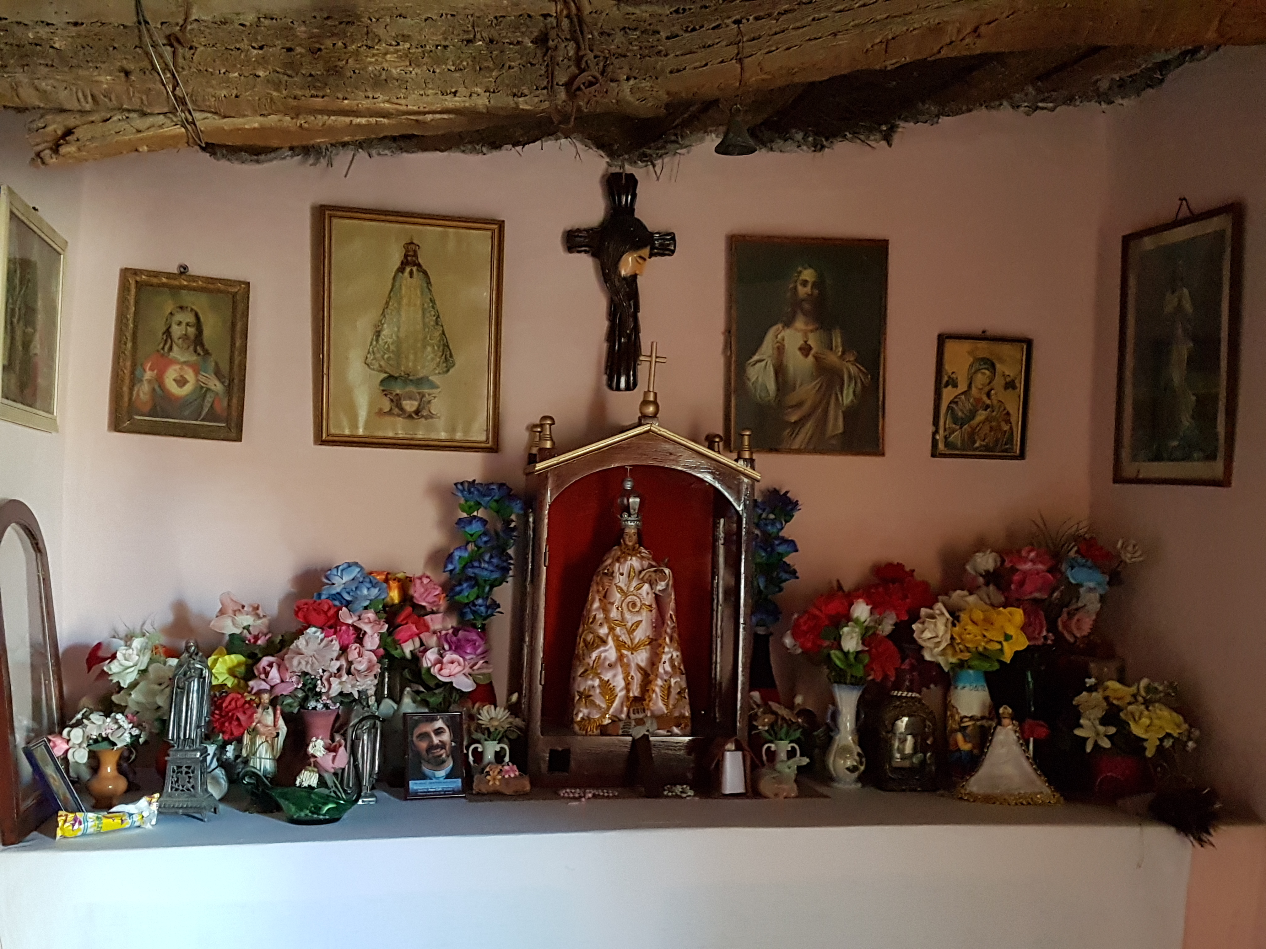 Ubicada en el Paraje de Carrera Muerta, depto de Rosario de Lerma. Provincia de Salta. Fue construida hace mas de 100 años, con materiales de la zona; paredes de adobe, techo de torta de paja (barro, paja y cardón). Su fiesta patronal se realiza todos los años el 2 de Febrero. Los fieles recorren 5 horas caminado en procesión por los cerros con la virgen cargada al hombro en andas.Capilla Virgen de la Candelaria